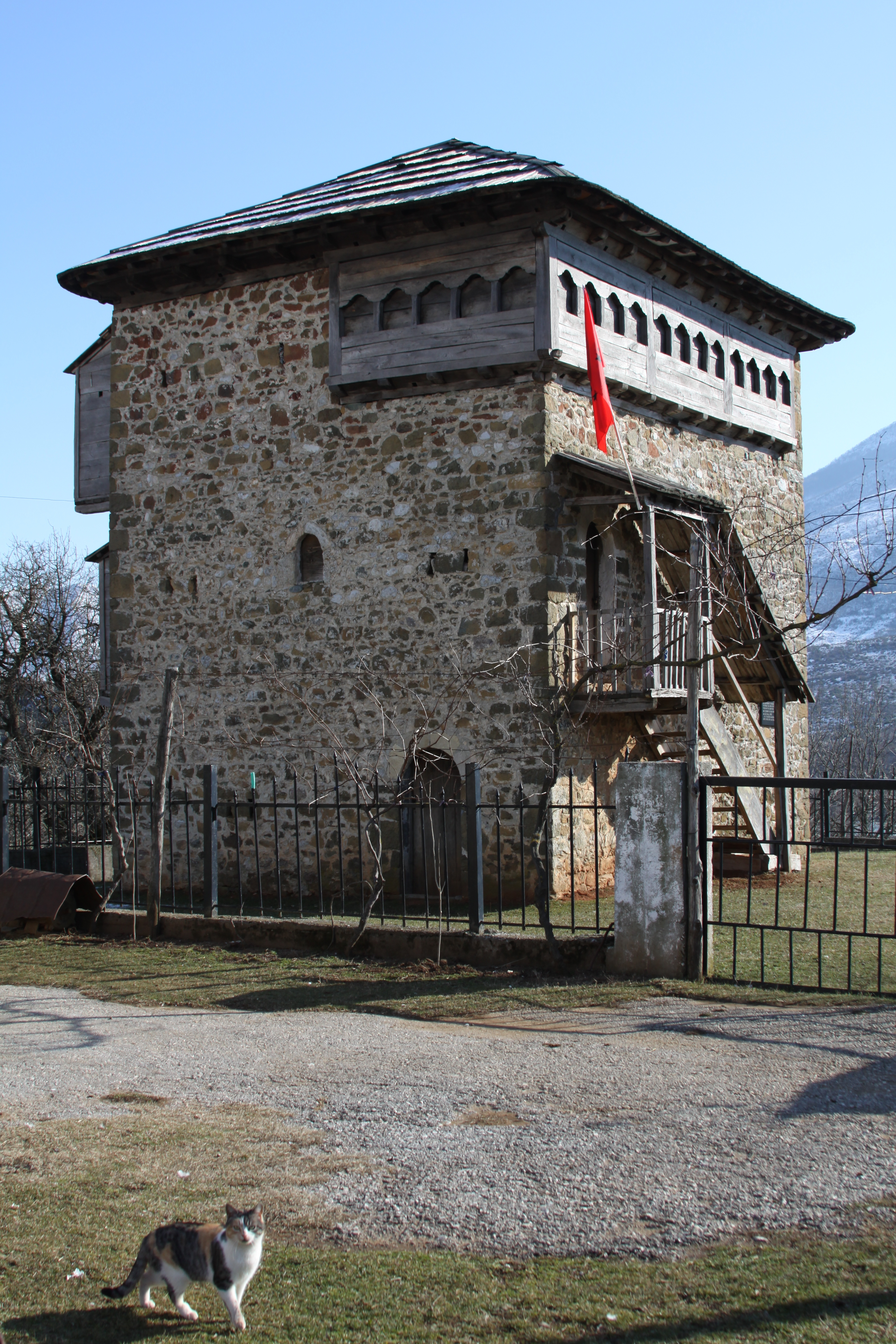 Kulla e Mic Sokolit Tropoje